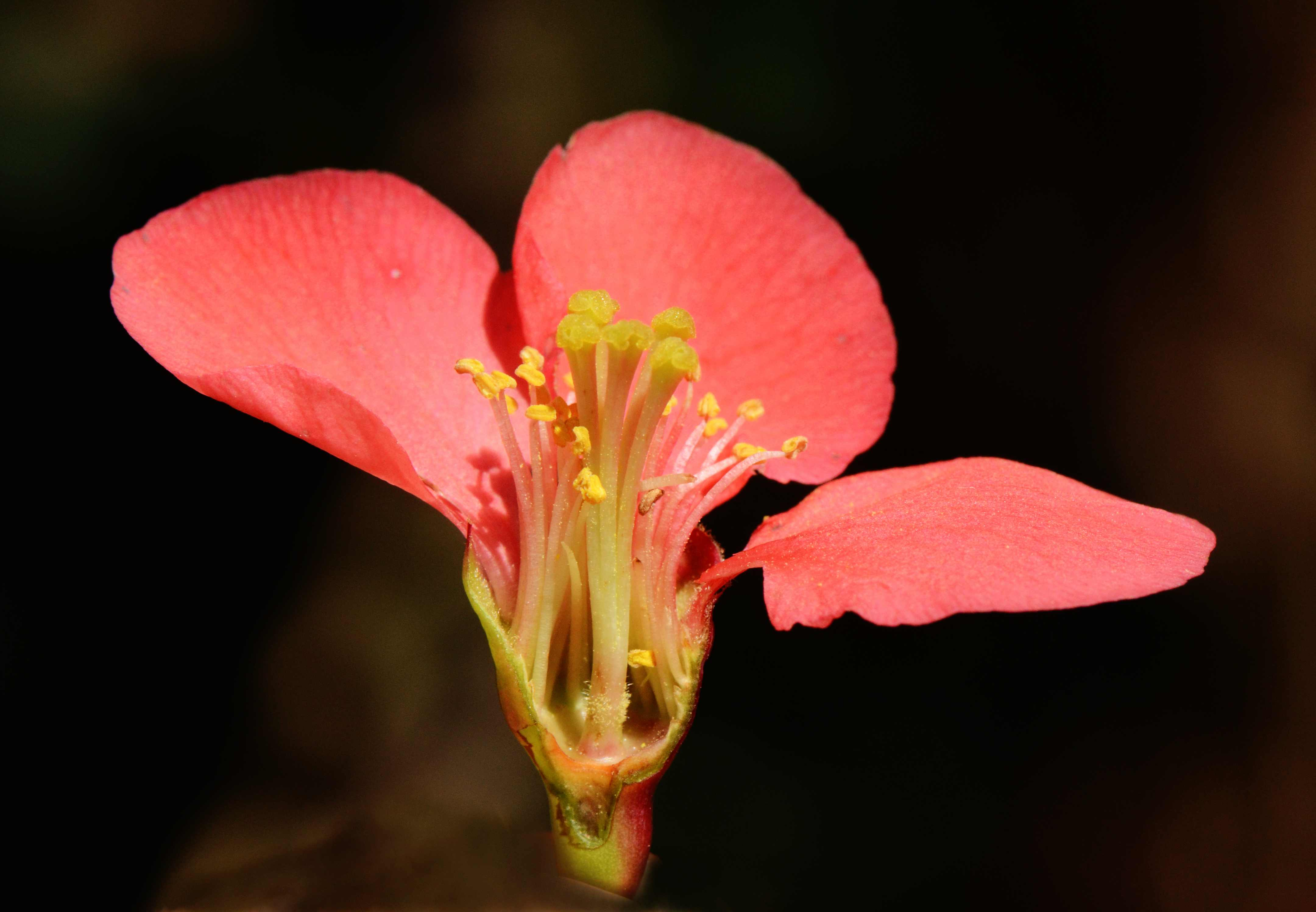 Section de fleur de cultivar ornemental de Chaenomeles